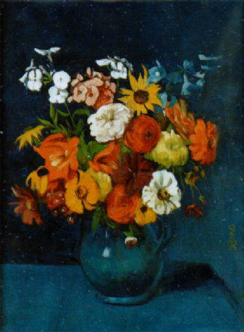 Blumenstilleben